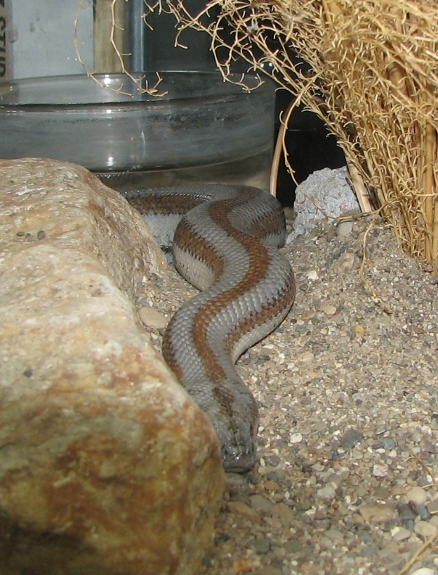 Rosy Boa (Lichanura orcutti)